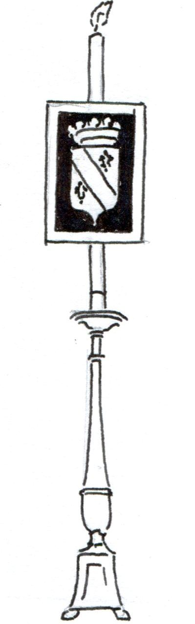 Candeliere con stemma funebre